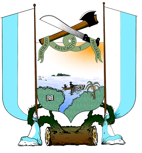 Escudo de Guapi